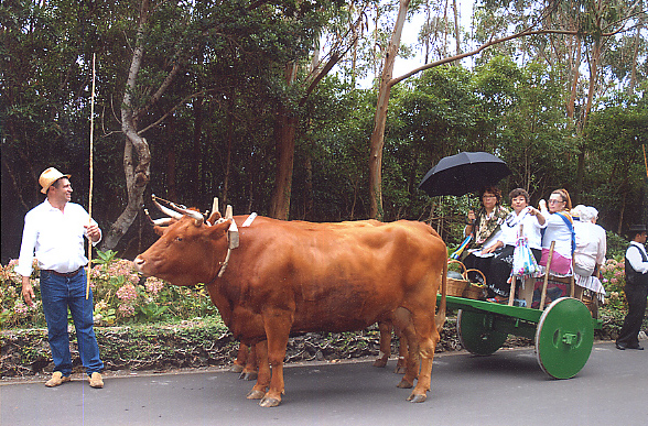 Antigo carro de bois com o condutor, Ilha Terceira, Açores. Note-se os bovinos da raça Ramo Grande, autóctone da ilha.